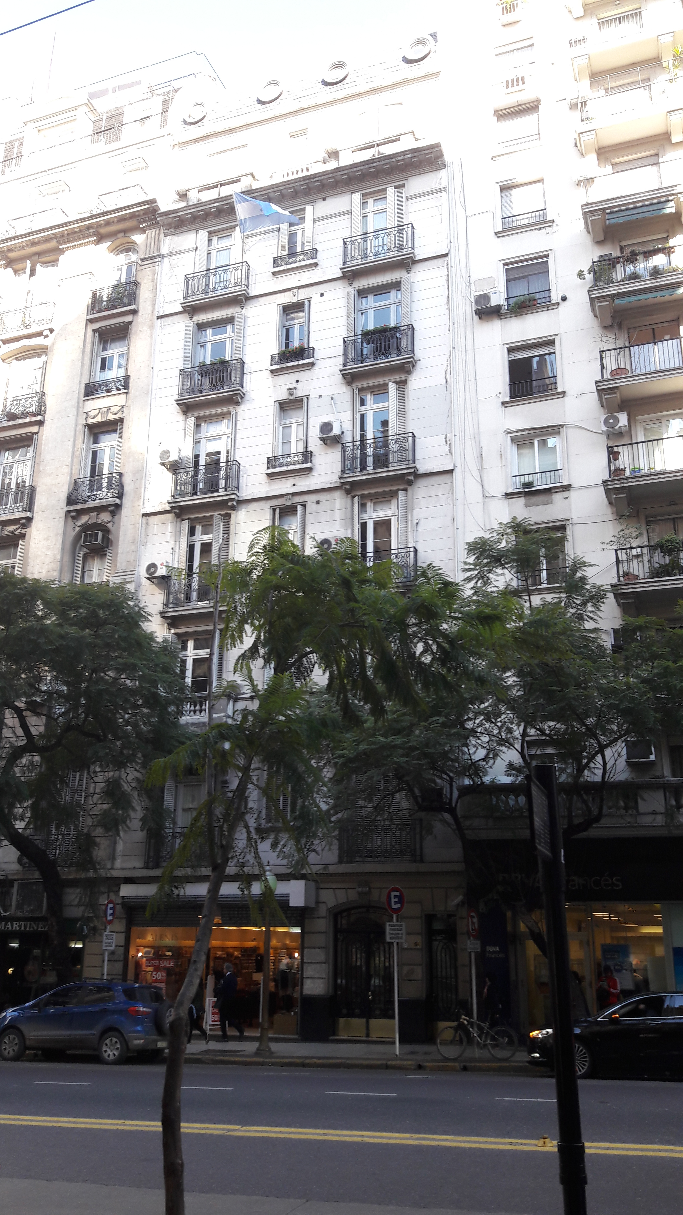 Embajada de Honduras en Buenos Aires